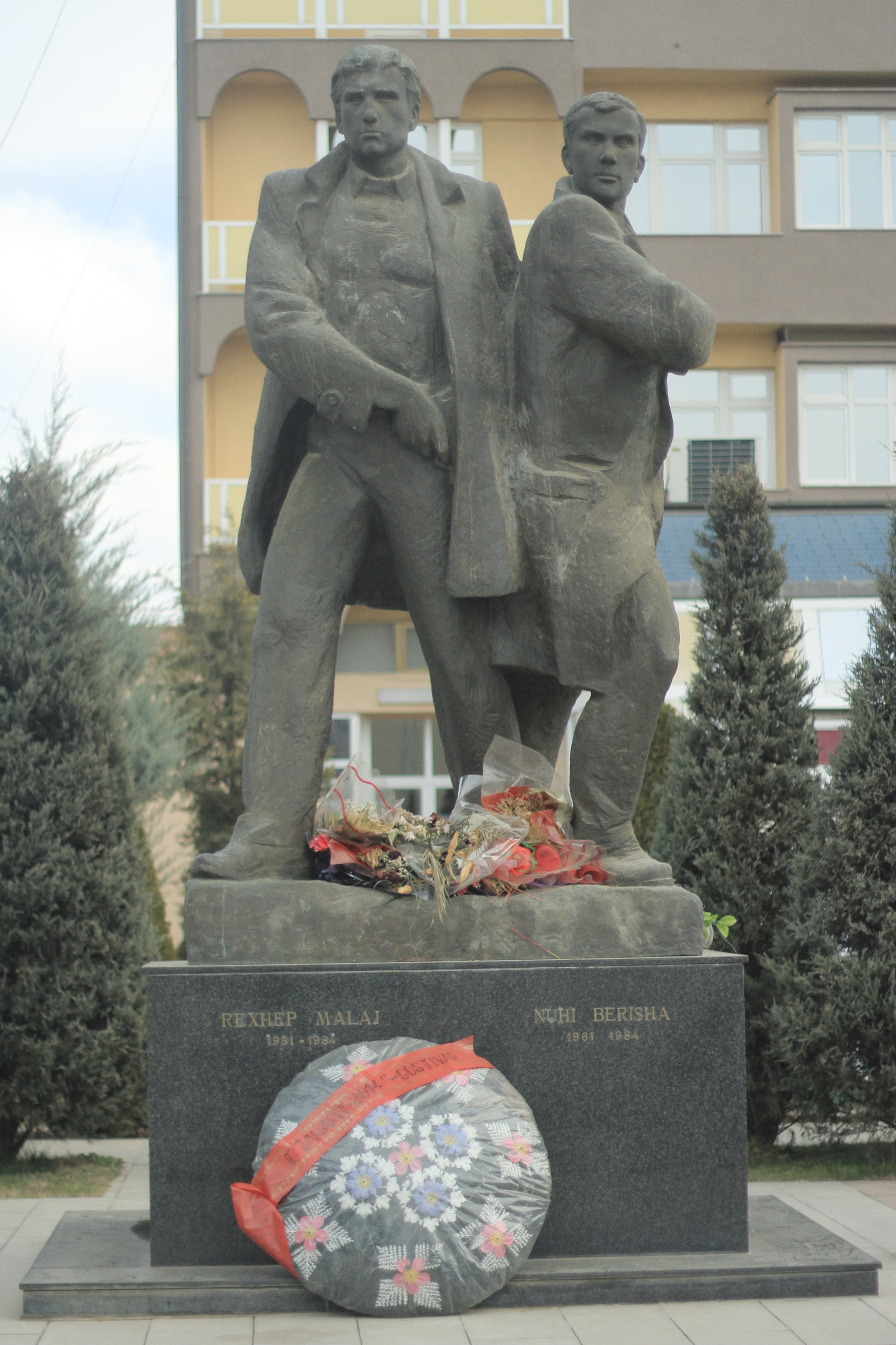 Permendorja Nuhi Berisha e Regjep Mala Afer Hotelit Kristal